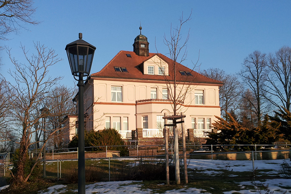 Die Villa Storchennest, ein denkmalgeschütztes Gebäude in Radeberg. Begegnungsstätte des Taubblindendienstes e.V.